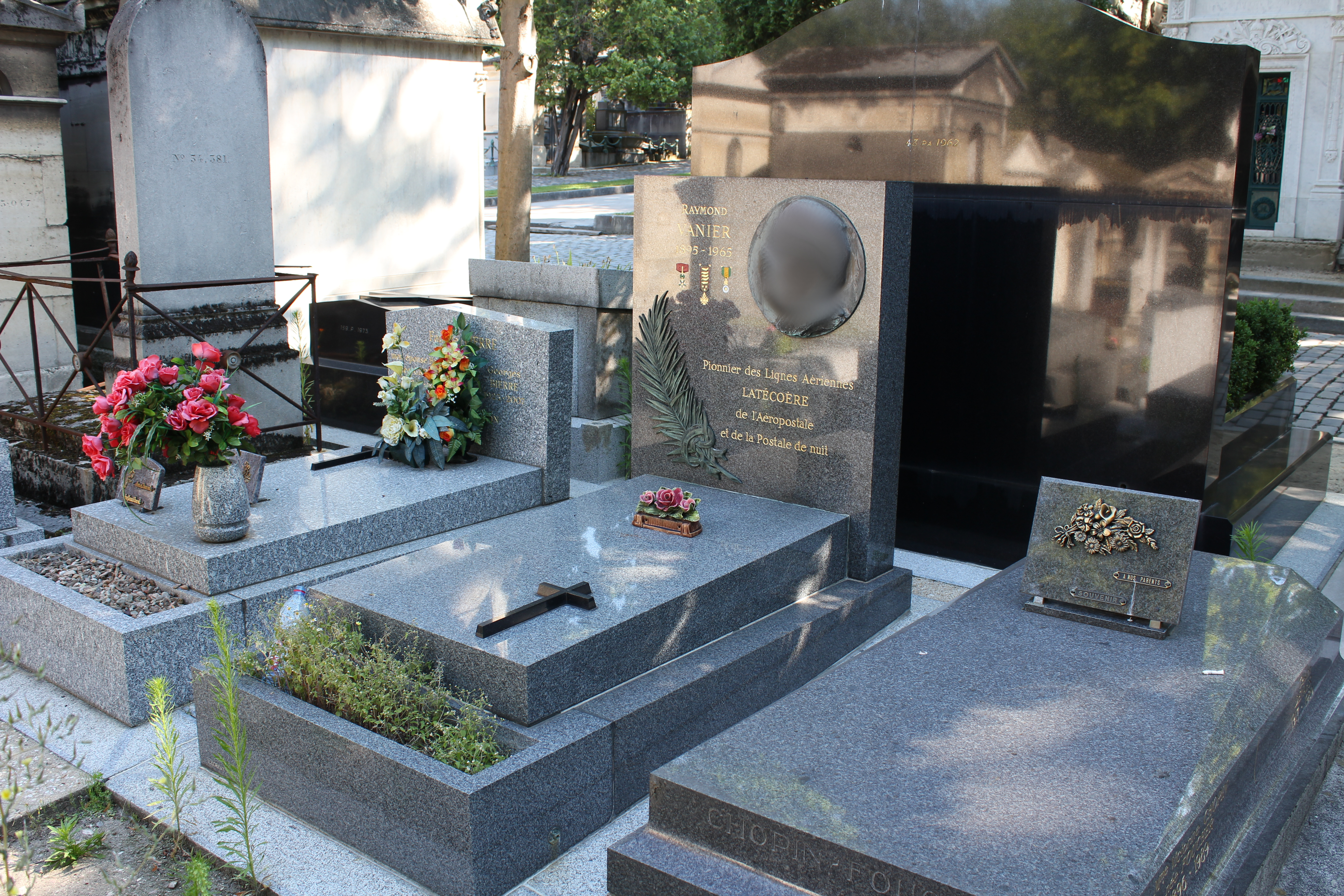 Tombe ornée d'un médaillon en bronze non signé représentant Raymond Vanier. Photo du médaillon floutée pour respecter le droit d'auteur de l'artiste.